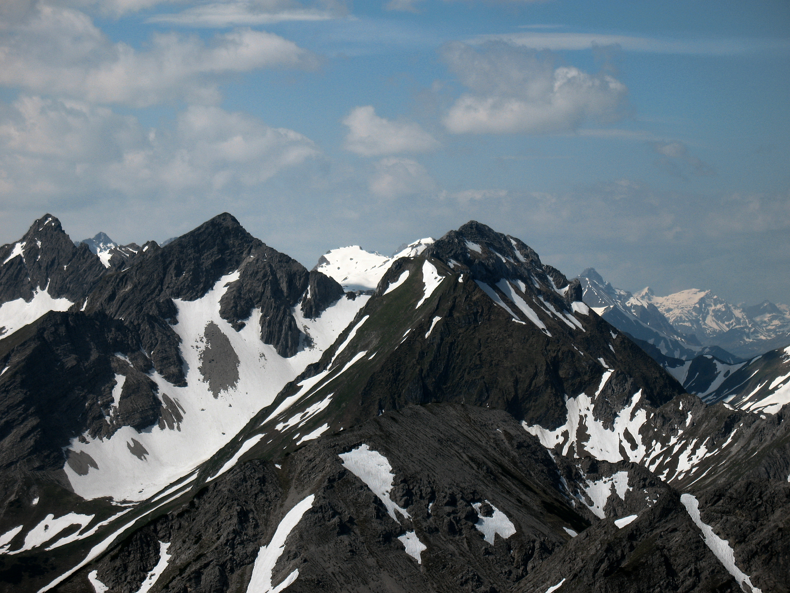 Fuchskarspitze (2314 m), Kesselspitze (2284 m) und Glasfelderkopf (2270 m) vom Lahnerkopf (2121 m) aus gesehen, im Vordergrund die Schänzlekopf (2070 m).